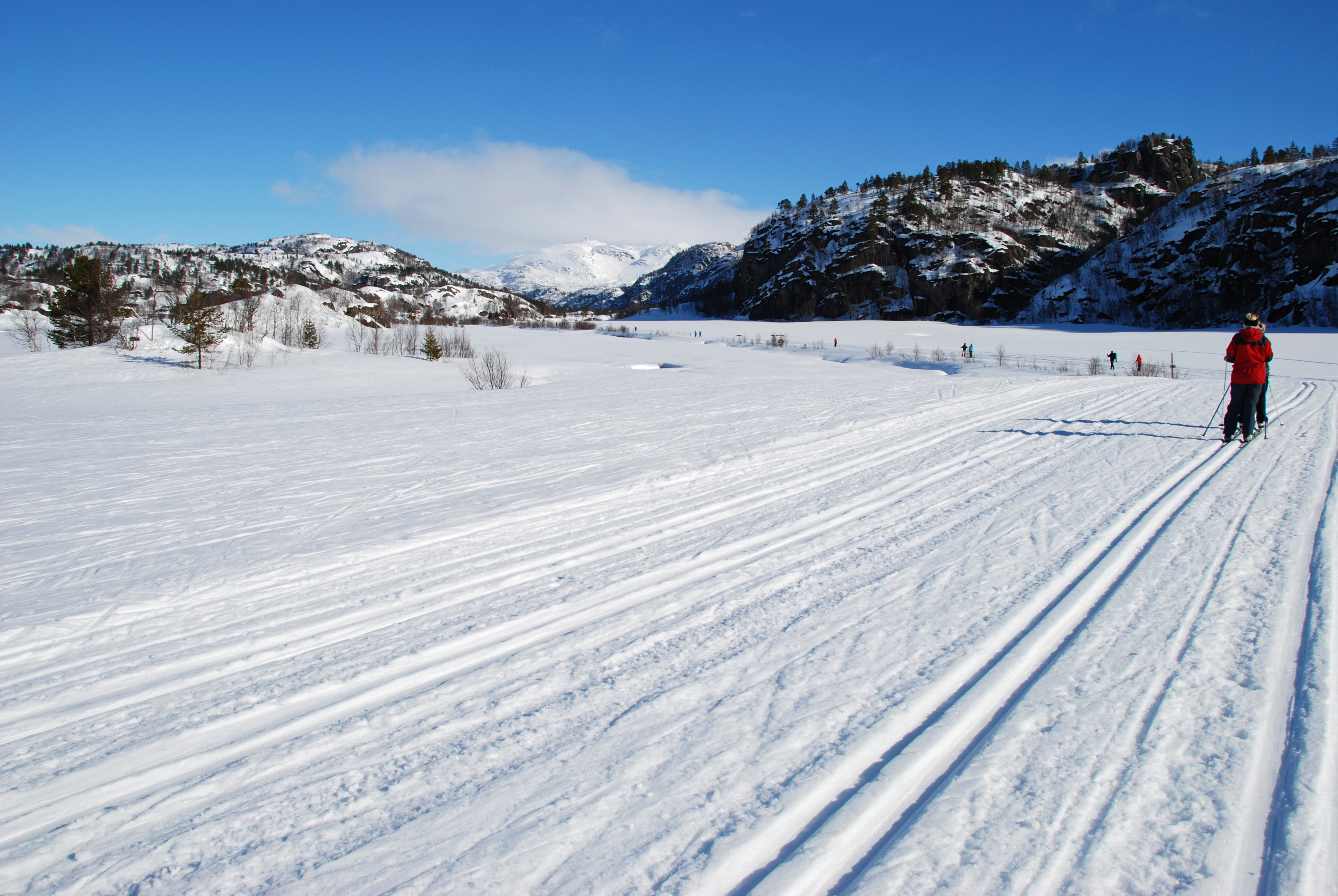 Sirdal og dets mange skiløyper